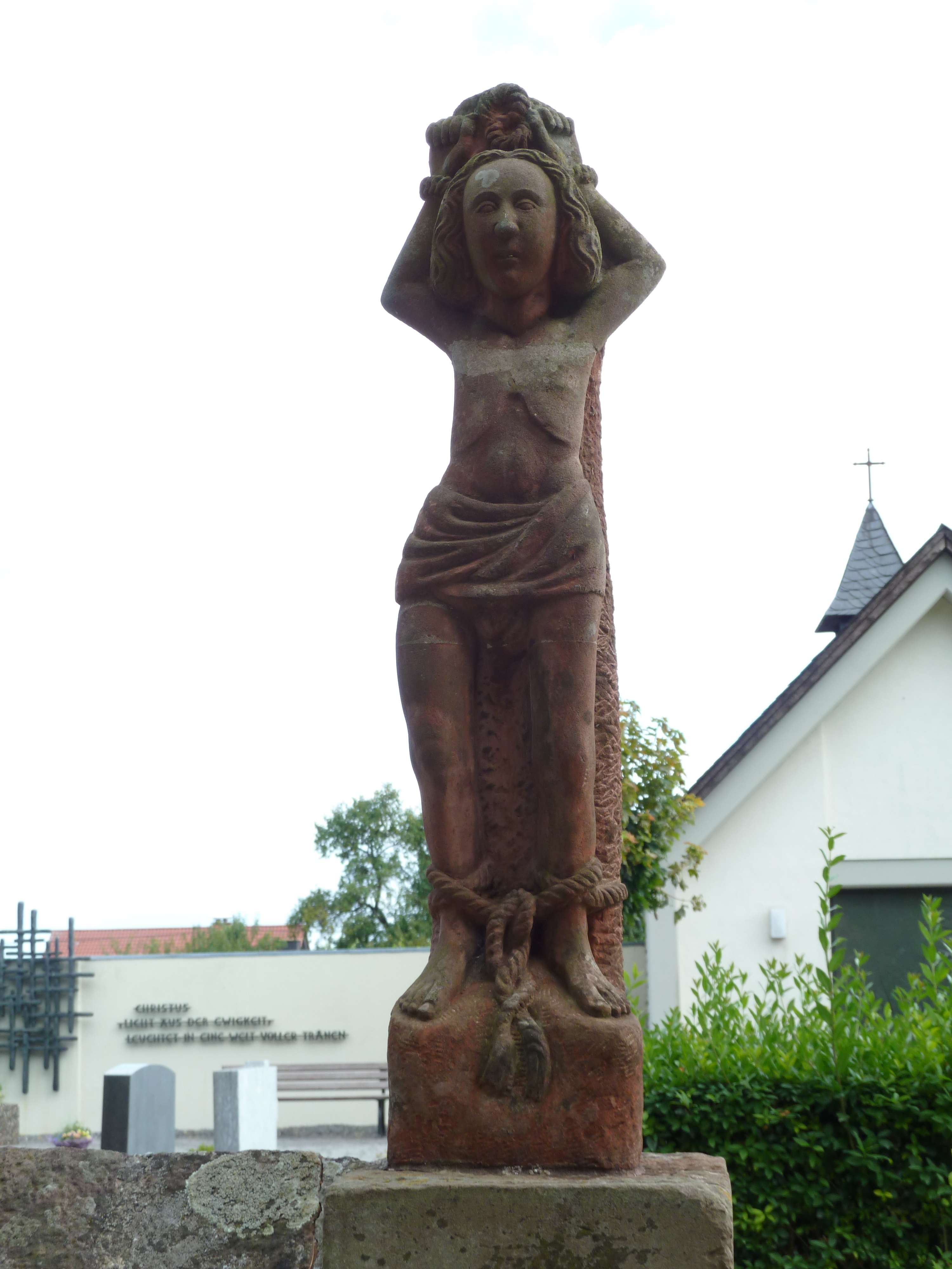 Stenen sculptuur bij de begraafplaats aan de Schulstrasse in Badem. Dichtstbij de Dudeldorfer Strasse.